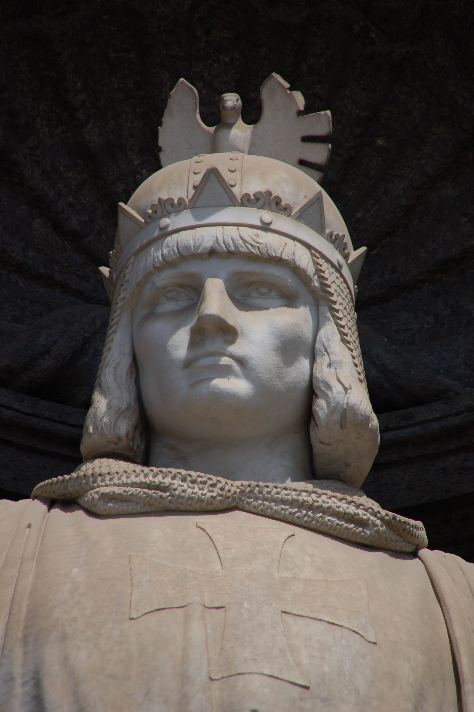 Statua sulla facciata del Palazzo Reale di Napoli: Federico II di Svevia - Hohenstaufen (Federico II imperatore del Sacro Romano Impero, Federico I di Sicilia), re di Napoli.